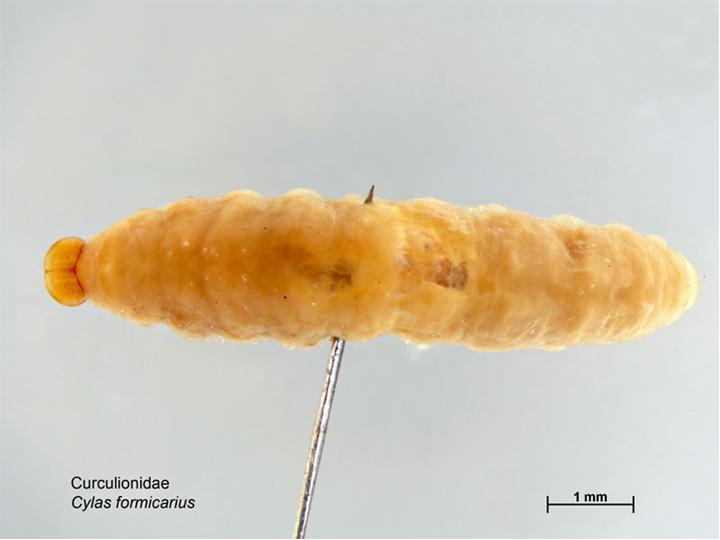 Cylas formicarius larva.